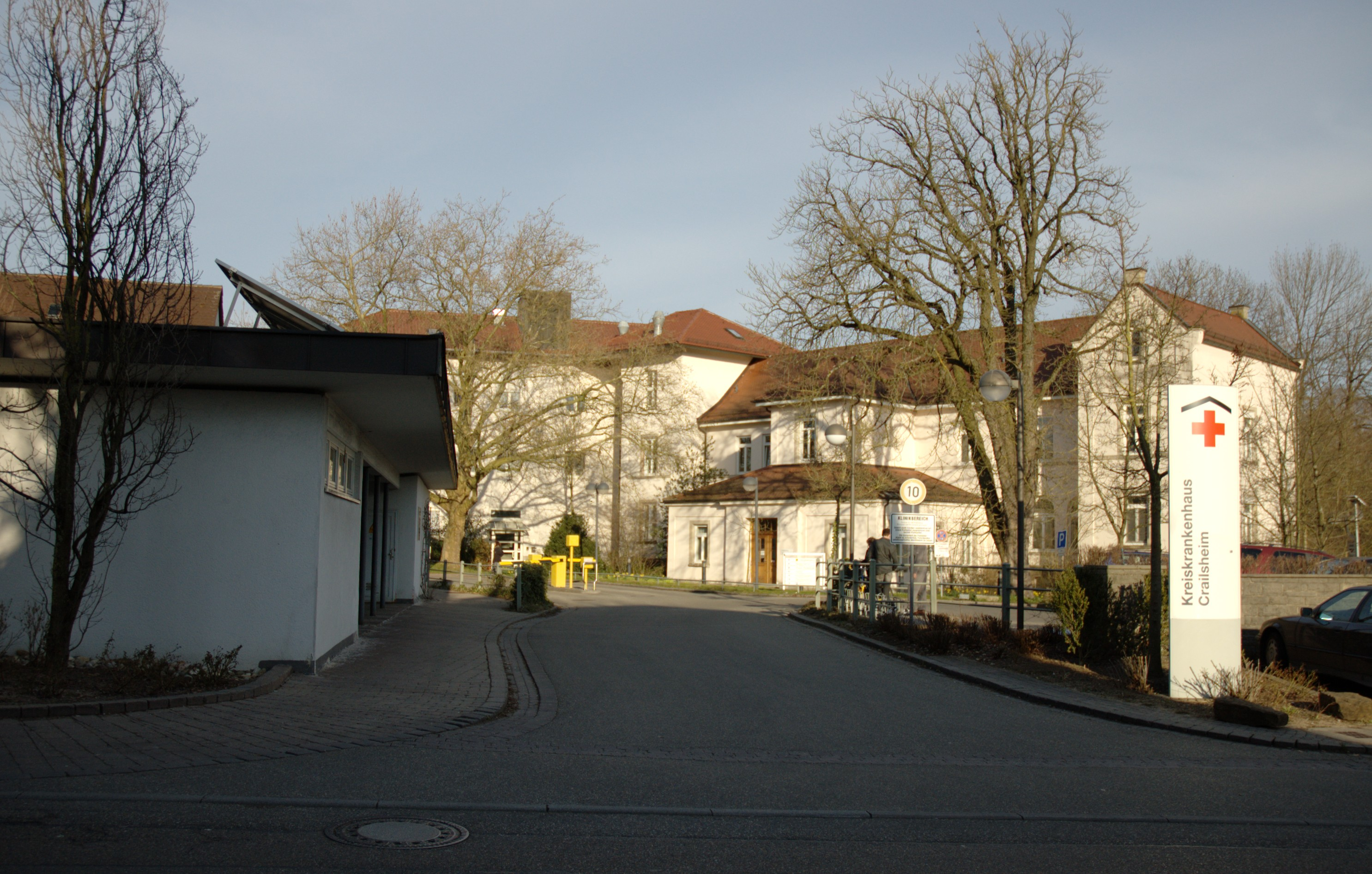 Krankenhaus Crailsheim